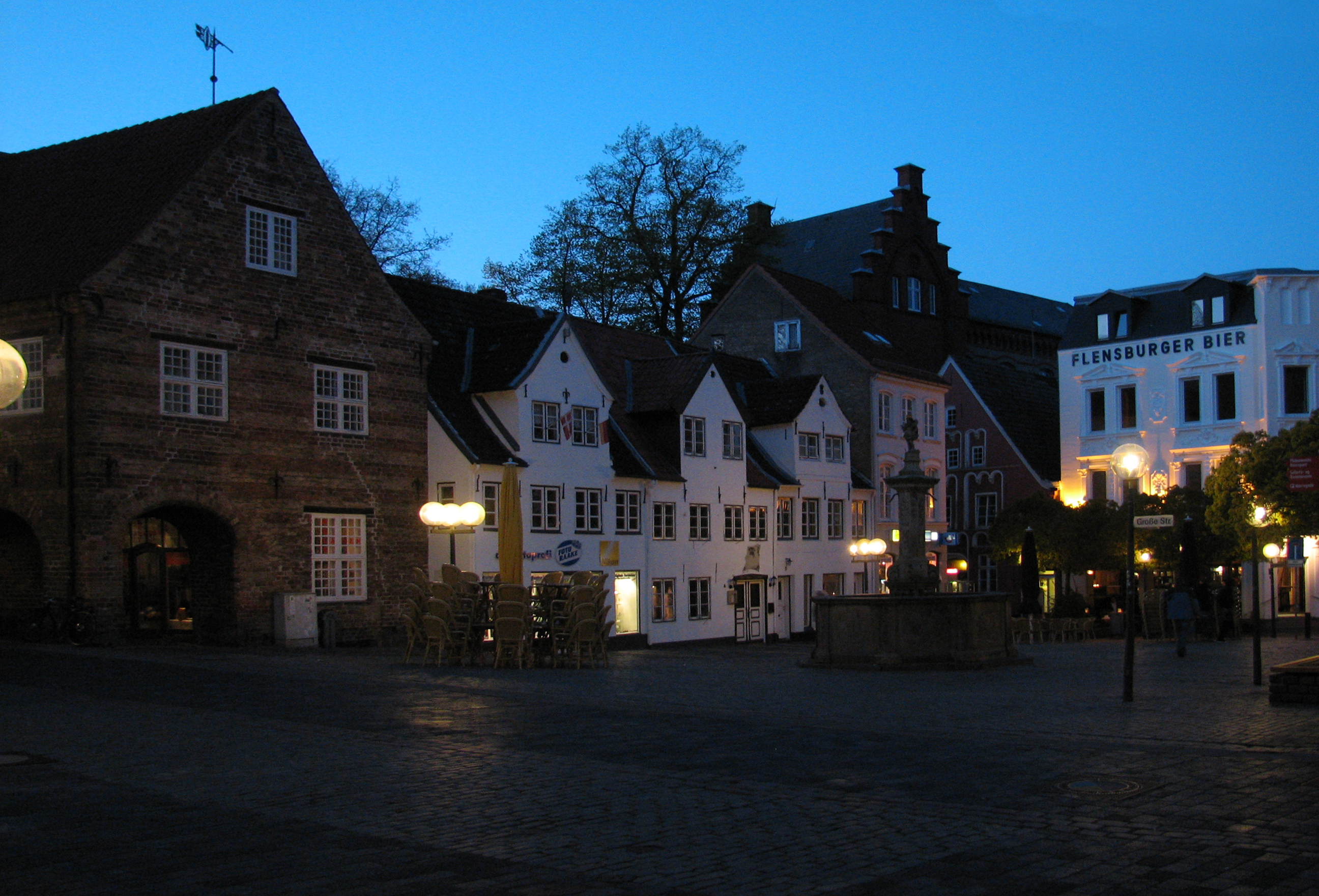 Bildbeschreibung: Nordermarkt in Flensburg; sowie Gebäude mit Schriftzug Flensburger Bier im Hintergrund